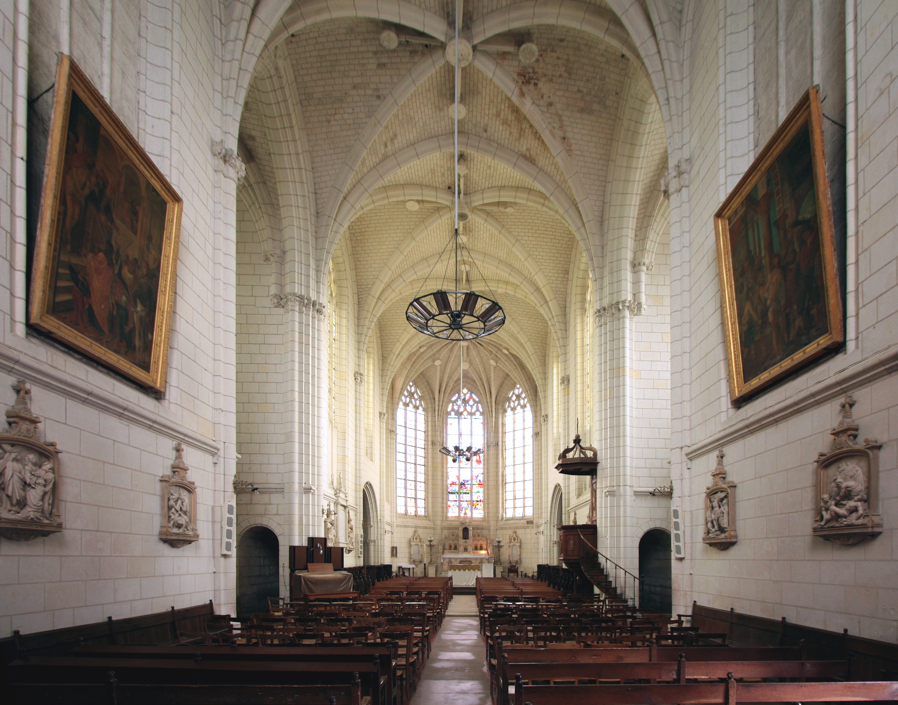 Intérieur de la collégiale Saint-Jean-Baptiste de Montrésor.